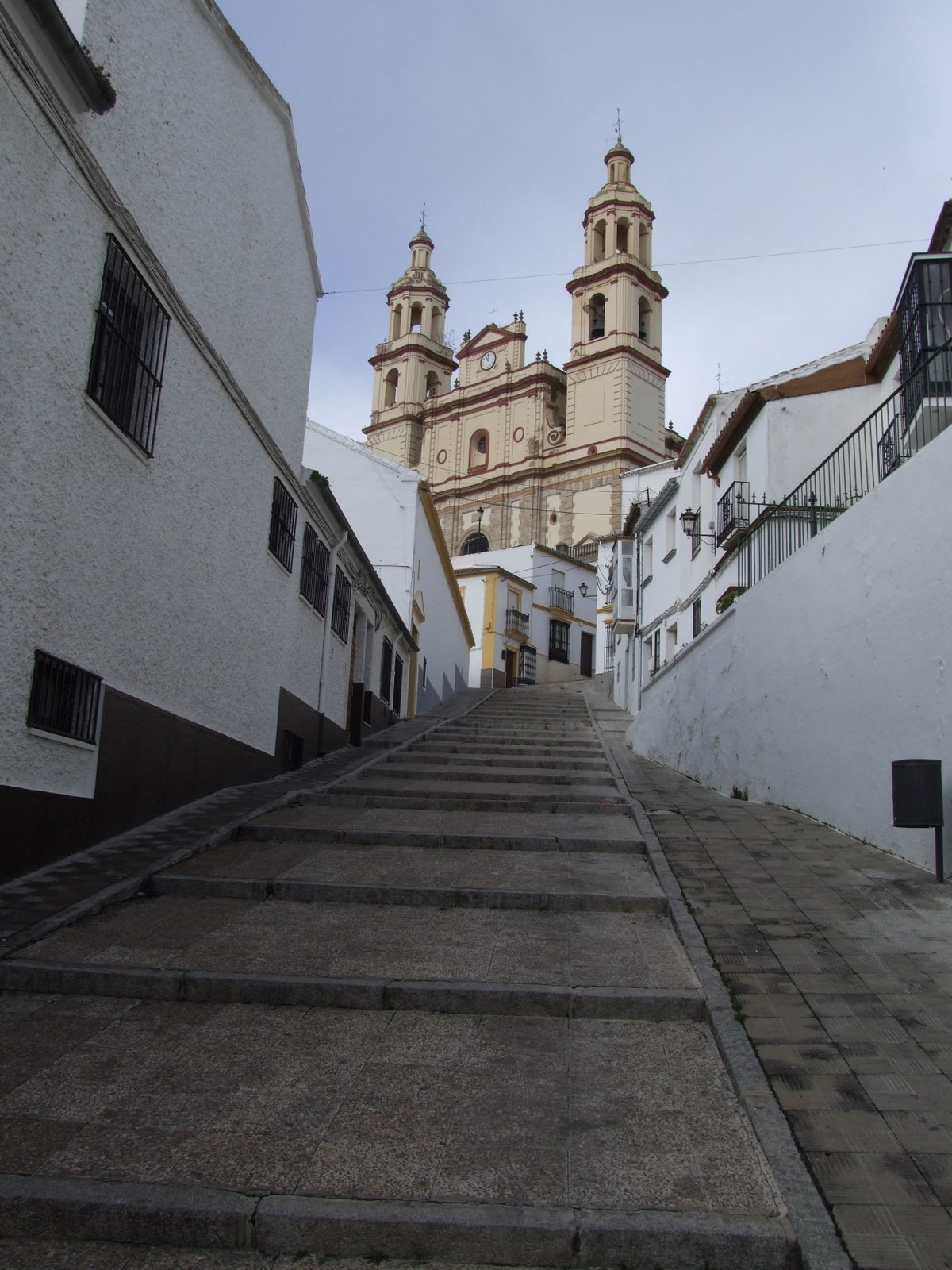 Parroquia de Nuestra Señora de la Encarnación, Olvera